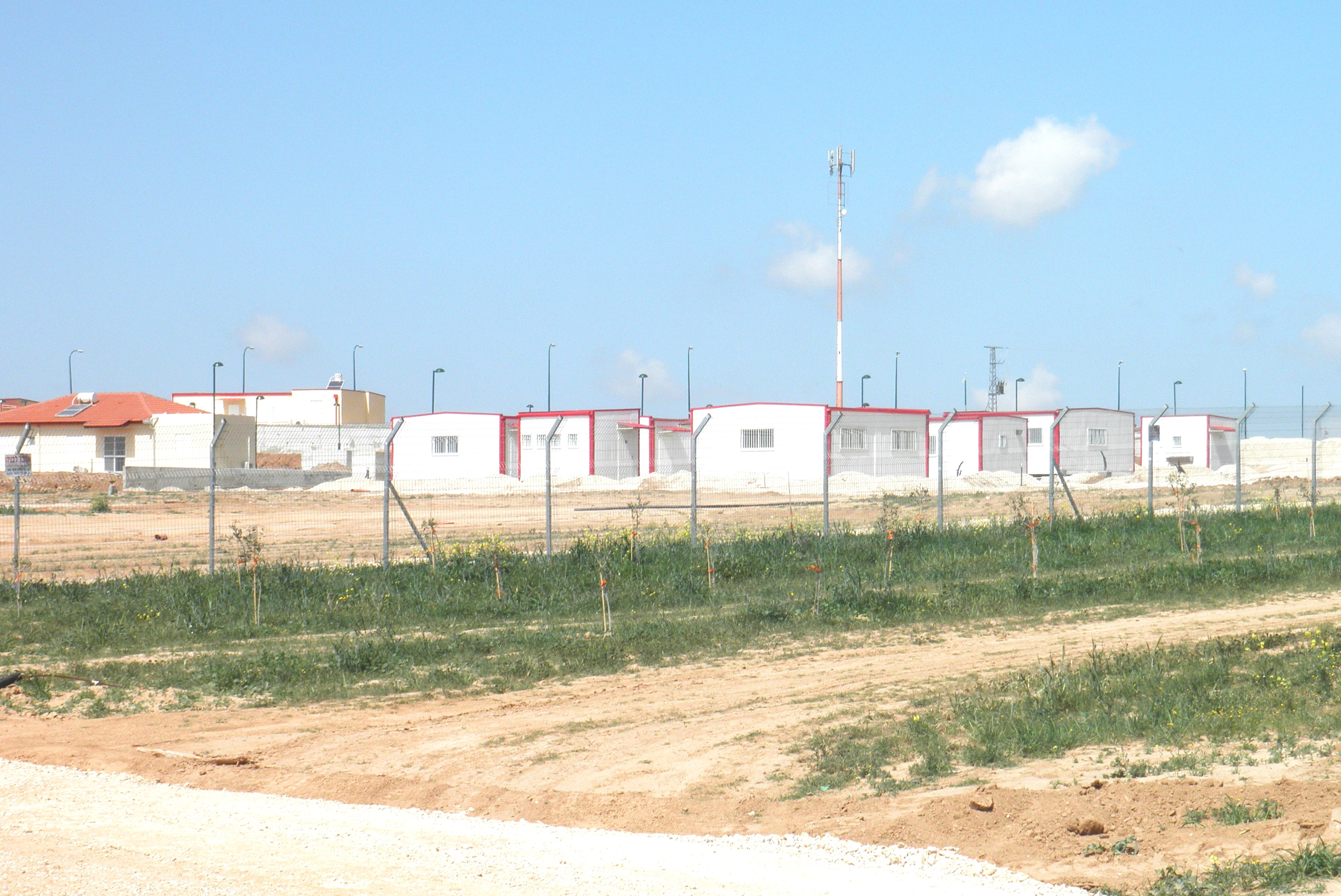 שבי דרום